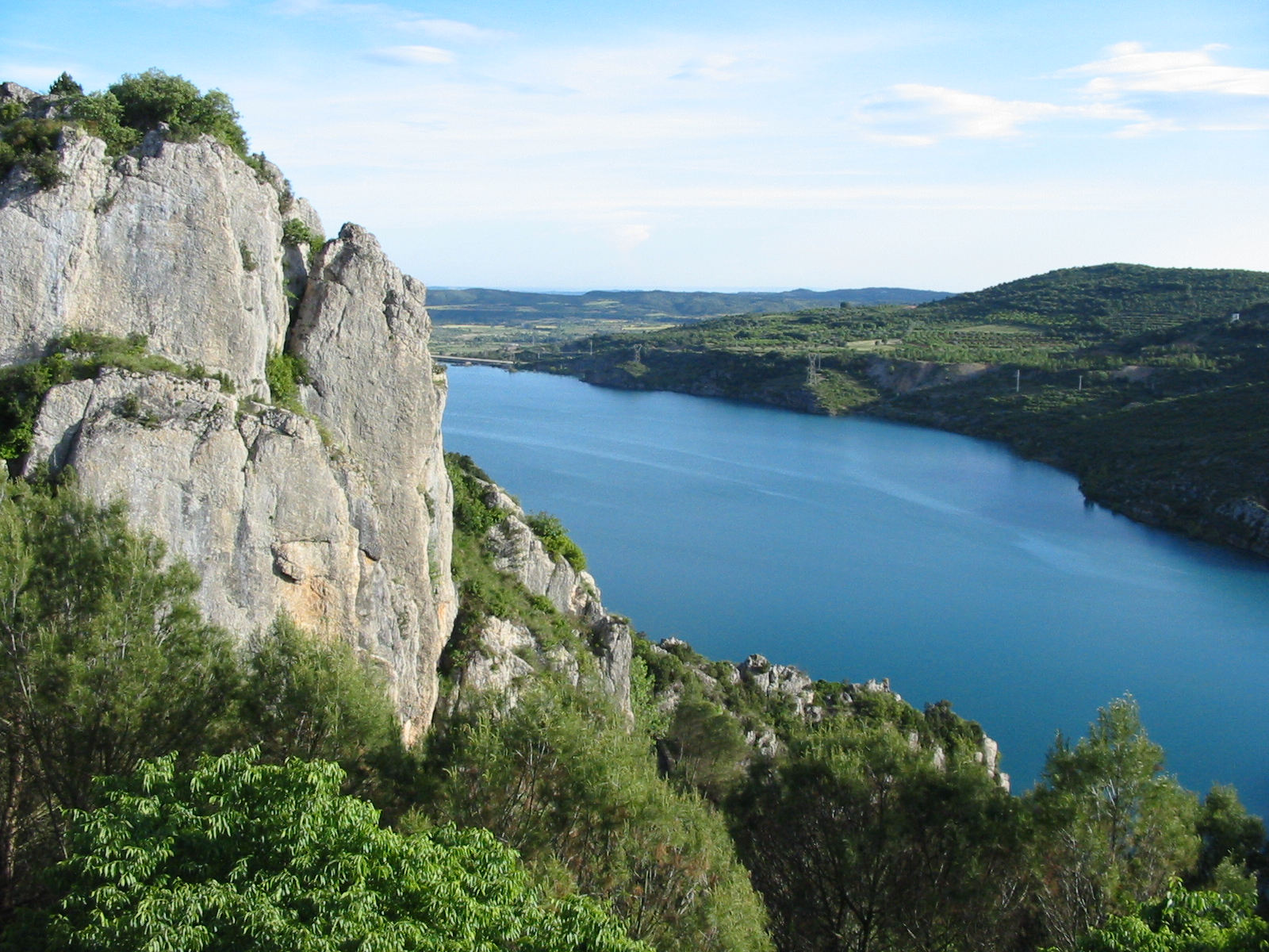 Aragonés: Entibo de Lo Grau